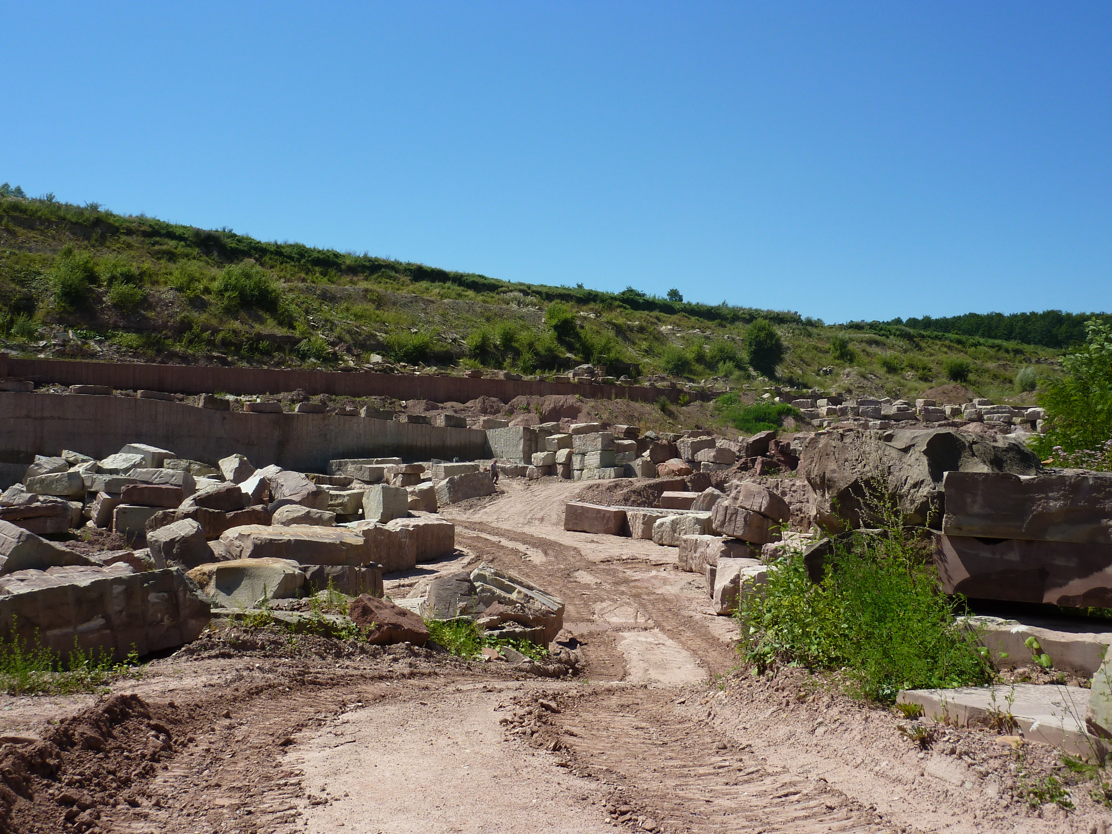 Carrière de grès Rauscher, Adamswiller, Bas-Rhin, France.